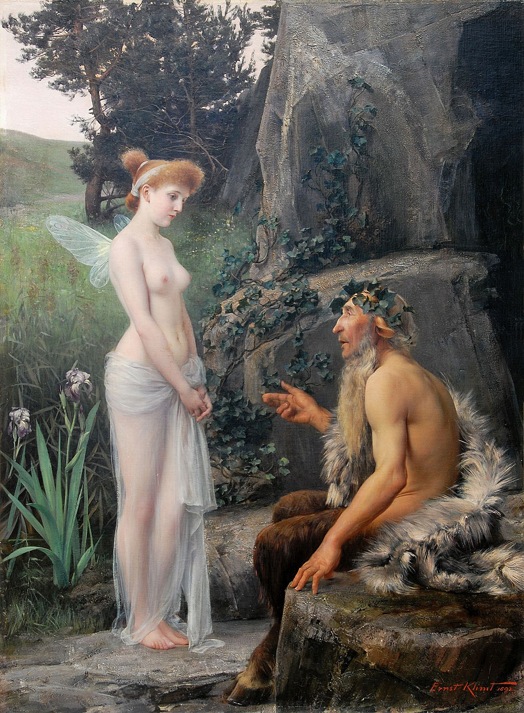 مشاوره روان پان اثر ارنست کلیمت در سال ۱۸۹۲. نقاشی به دلیل مرگ ارنست کلیمت در سال ۱۸۹۲ ناتمام ماند و برادرش گوستاو کلیمت آن را تکمیل کرد.